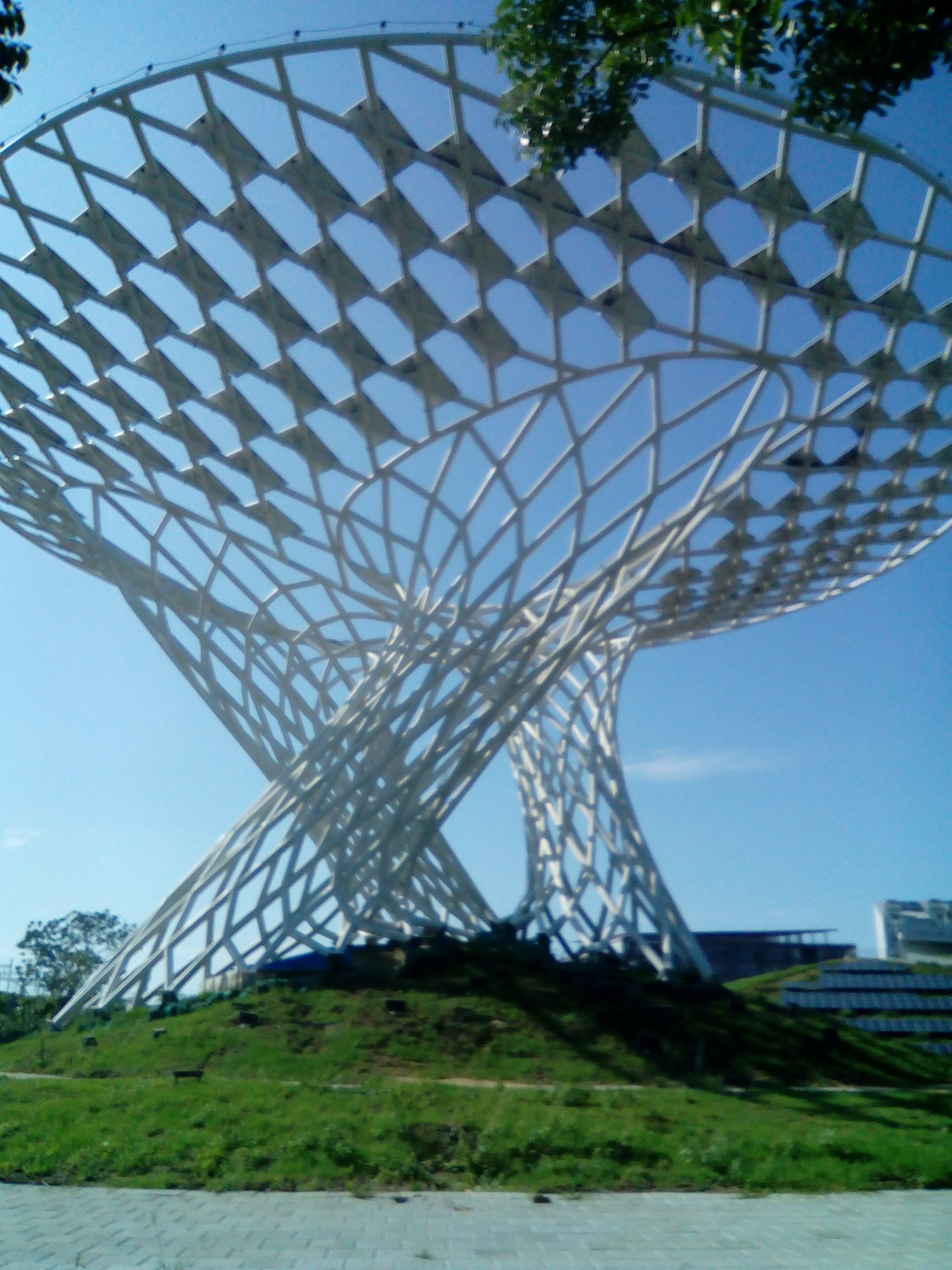 大武路及台39線交叉路口可見